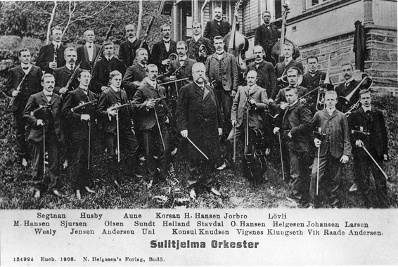 Sulitjelma orkester med diriktør Emil Knudsen som dirigent. 1908 SG.F.10009-2104